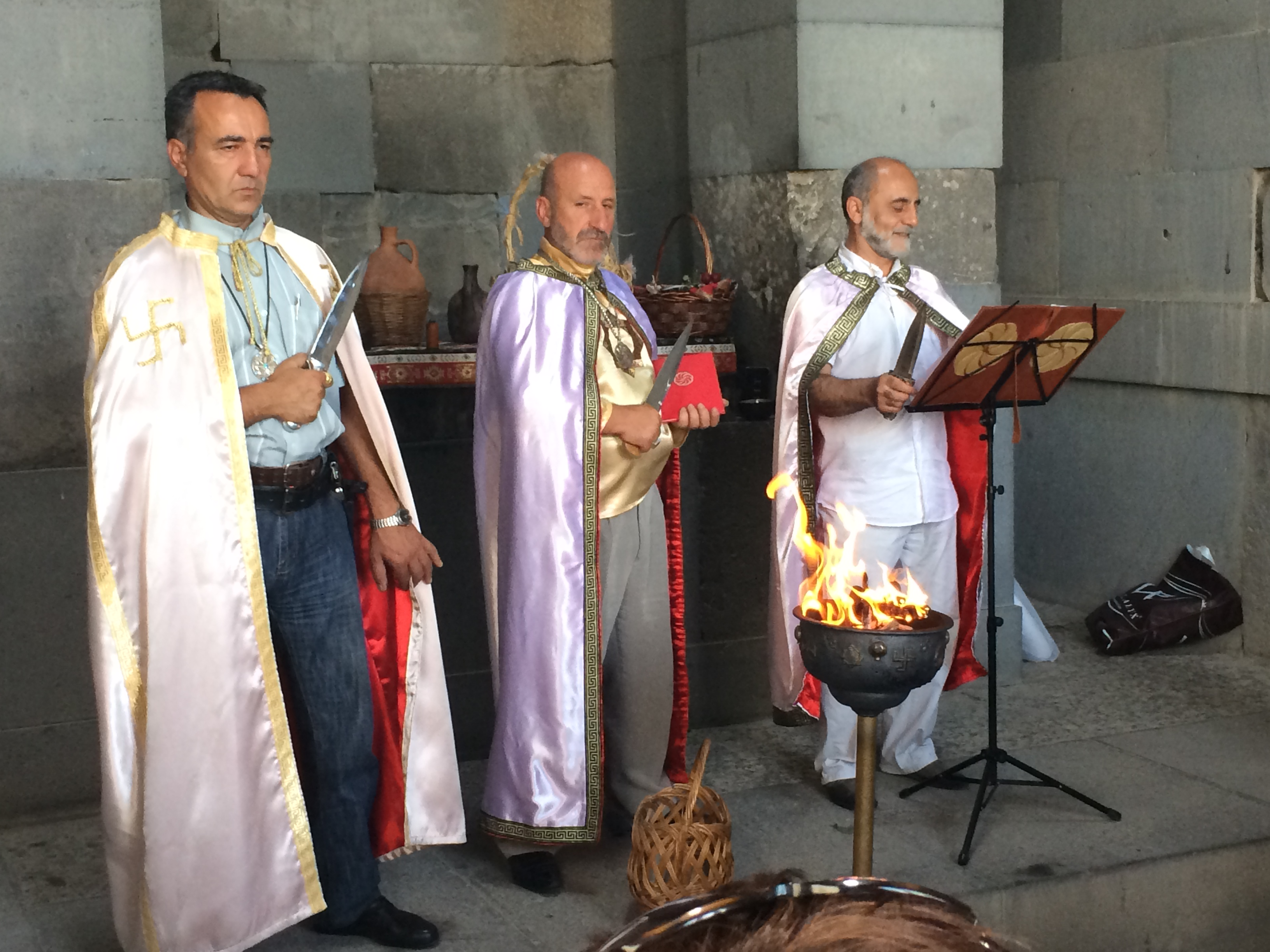 Նոր հեթանոսական արարողություն Գառնու տաճարում